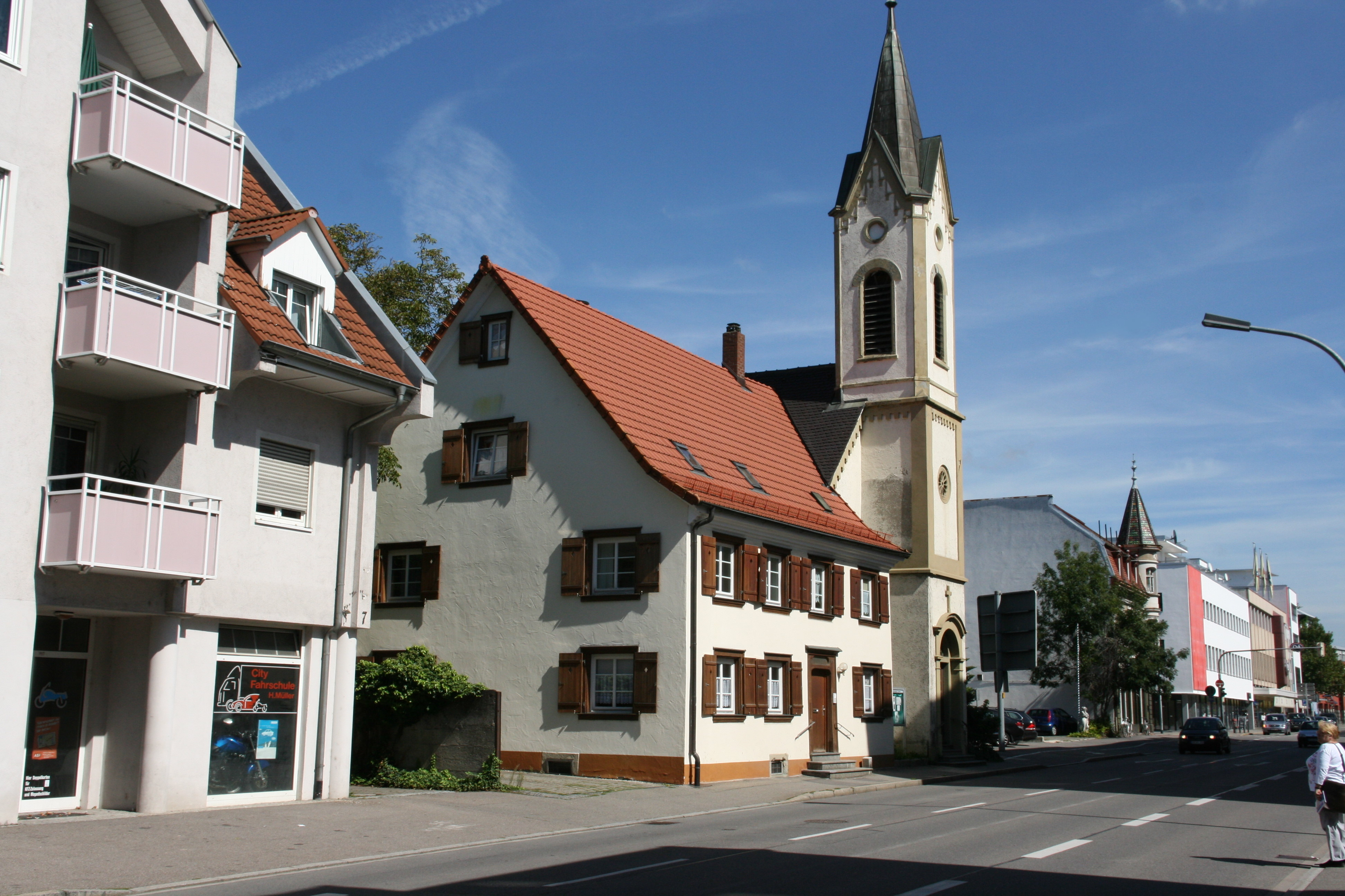 Altkatholische Kirche St. Thomas, Freiheitsstraße in Singen (Hohentwiel)